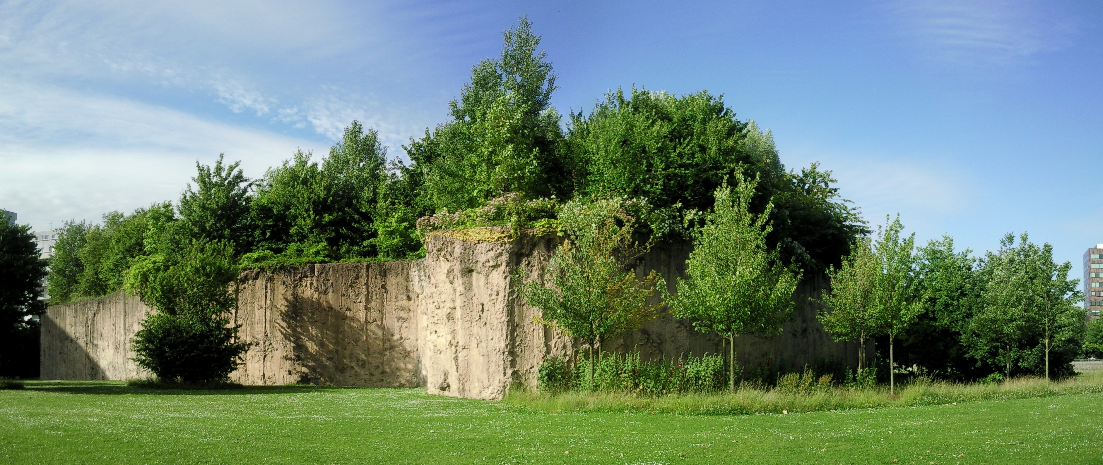 L'ile Derborence, forêt inaccessible de 2,5 hectares perchée sur un socle de sept mètres de haut dans le parc Matisse, à Lille (Nord).